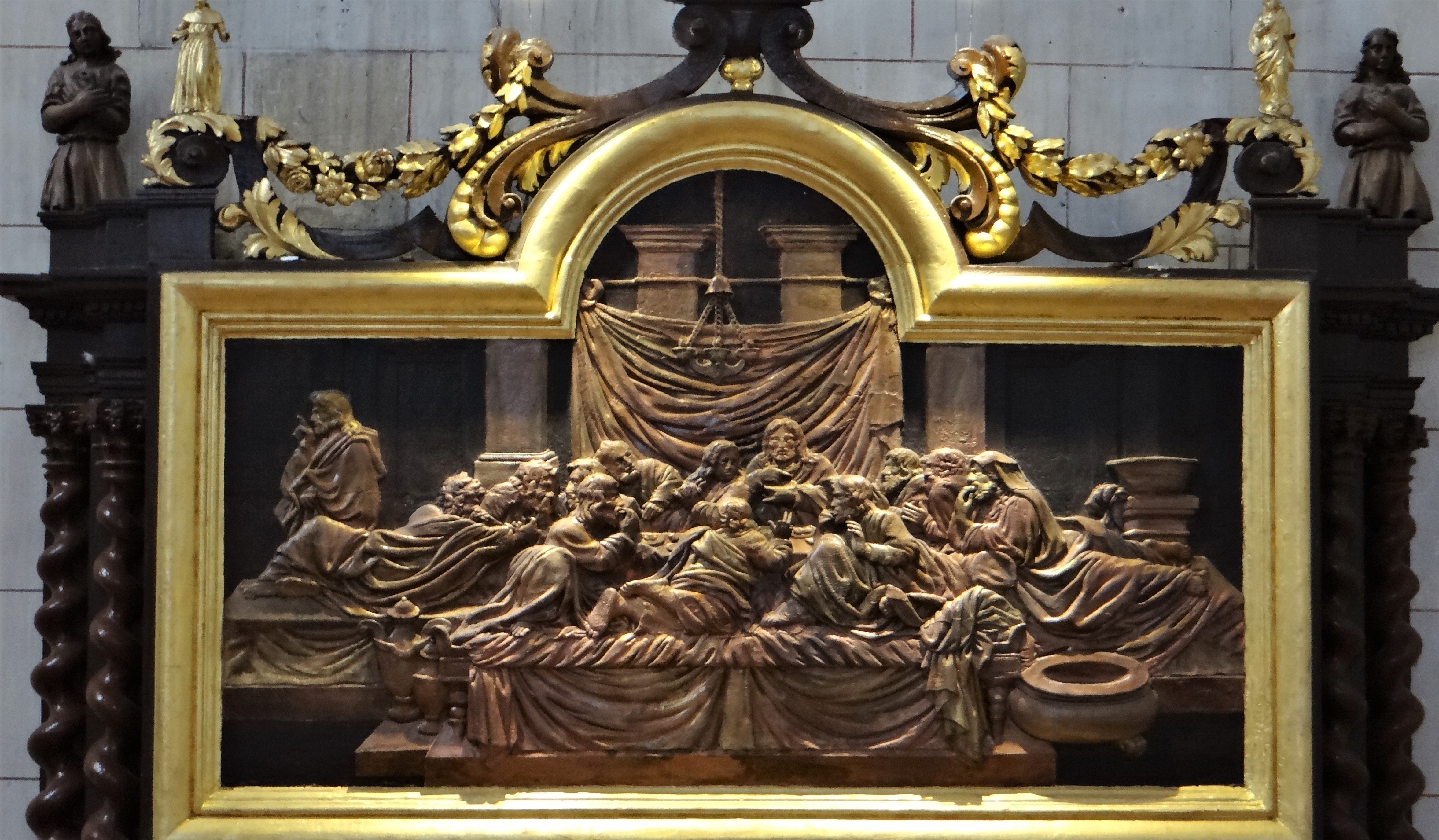 Le Bugue - Église Saint-Sulpice - Représentation de la Cène